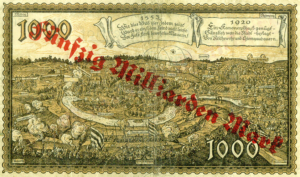 Notgeld aus Hof: 50 Milliarden Mark vom 24. Okotber 1923 (Überdruck auf 1000 Mark Schein von 1922)